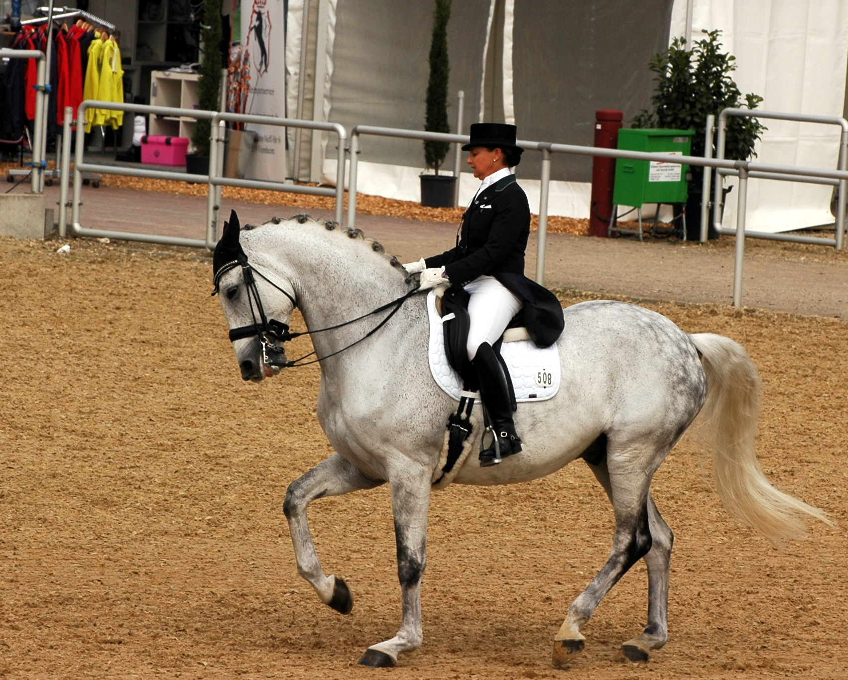 Maimarkt Mannheim 2015: 52. Maimarkt-Turnier: Bernadette Pujals mit Heslegaards Rolex